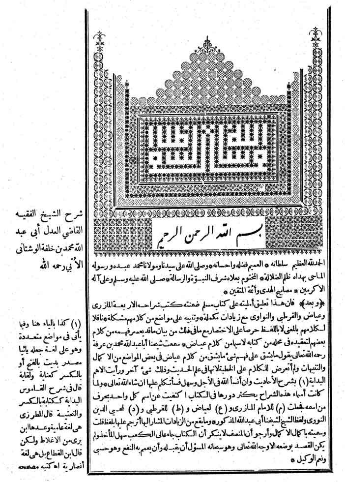 تصنيف:كتب الحديث تصنيف:كتب أهل السنة والجماعة تصنيف:أغلفة كتب